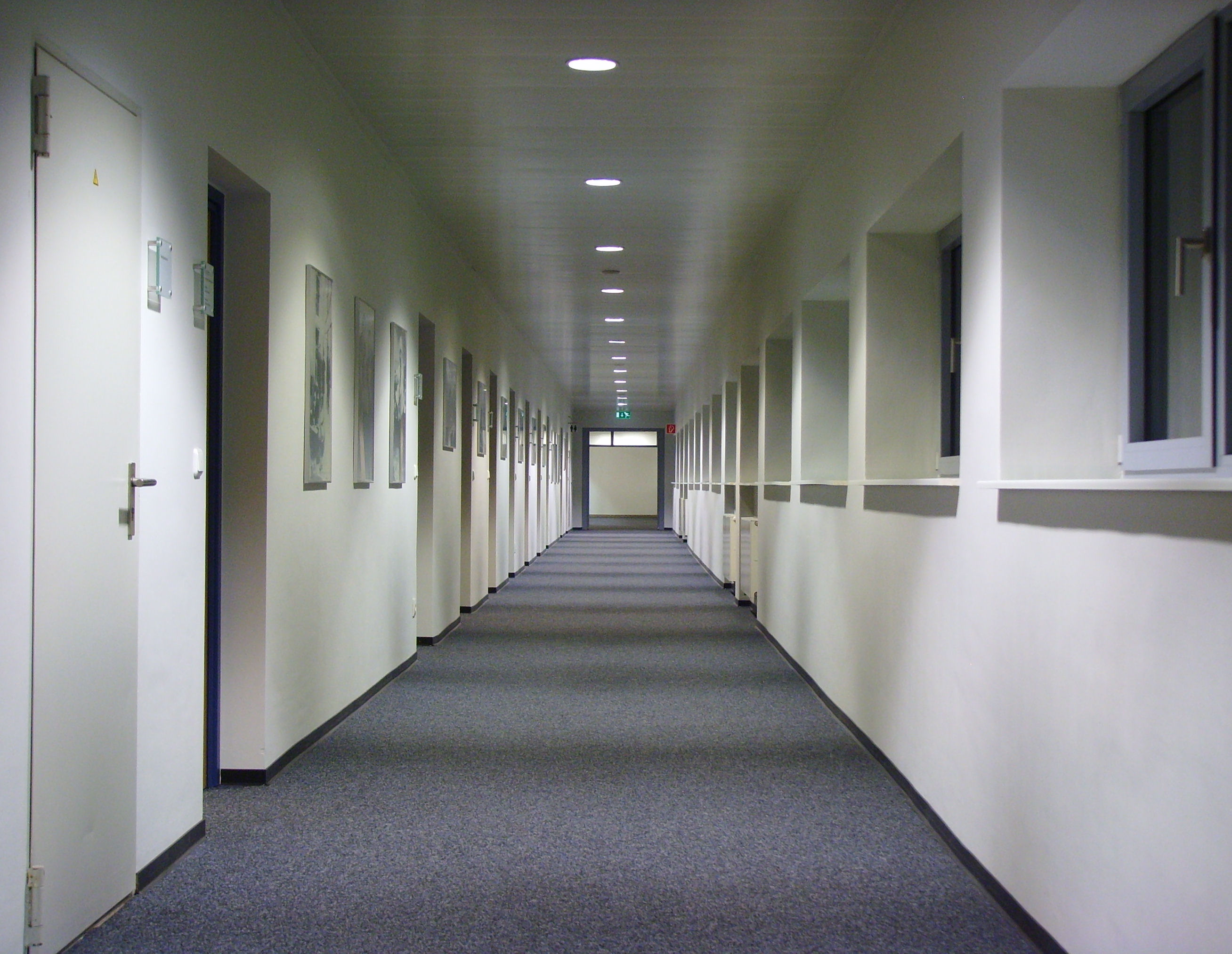 denkmalgeschützter V-Bau des Hessischen Rundfunks, Frankfurt am Main: Flur, innen